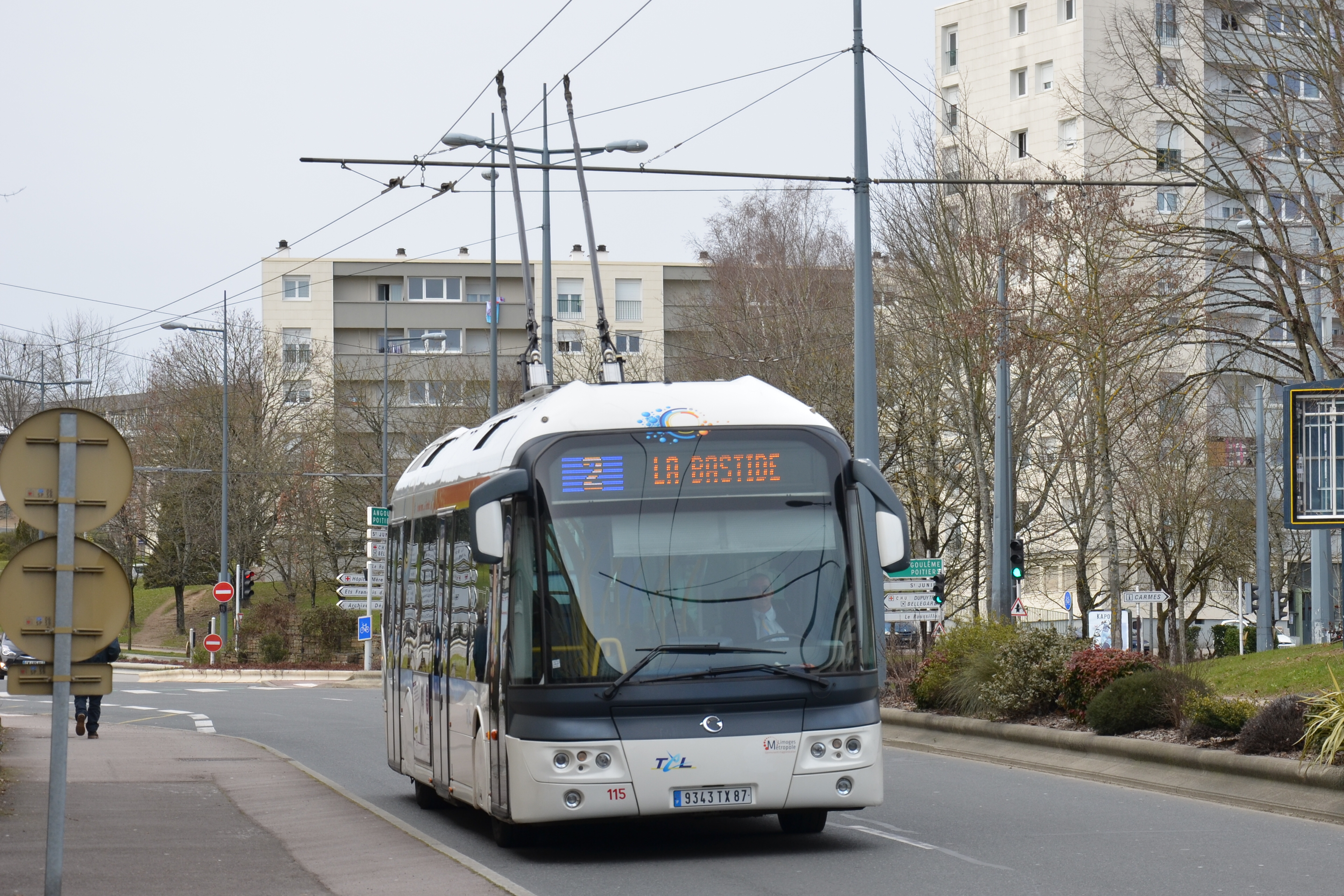 Cristalis ETB12 n°115 sur la ligne 2 du réseau TCL de Limoges, quittant son terminus P. Curie.